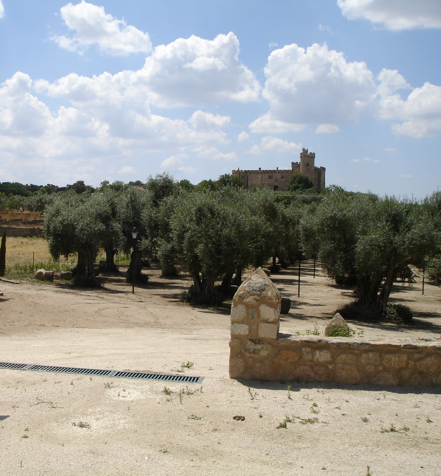 Castillo de las Arguijuelas de Arriba (Cáceres, España)